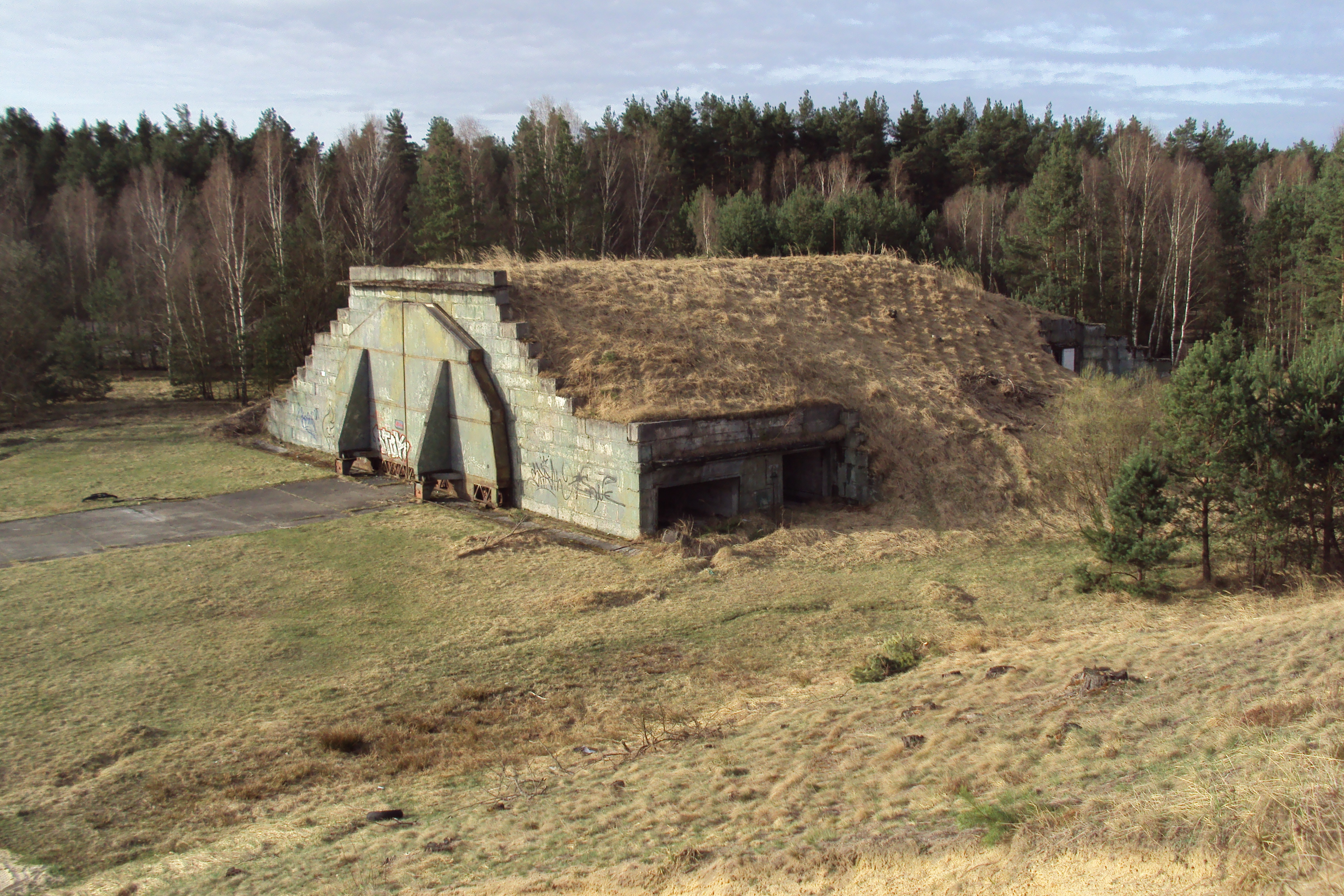 Jeden z sovětských bunkrů na kraji letiště Hradčany